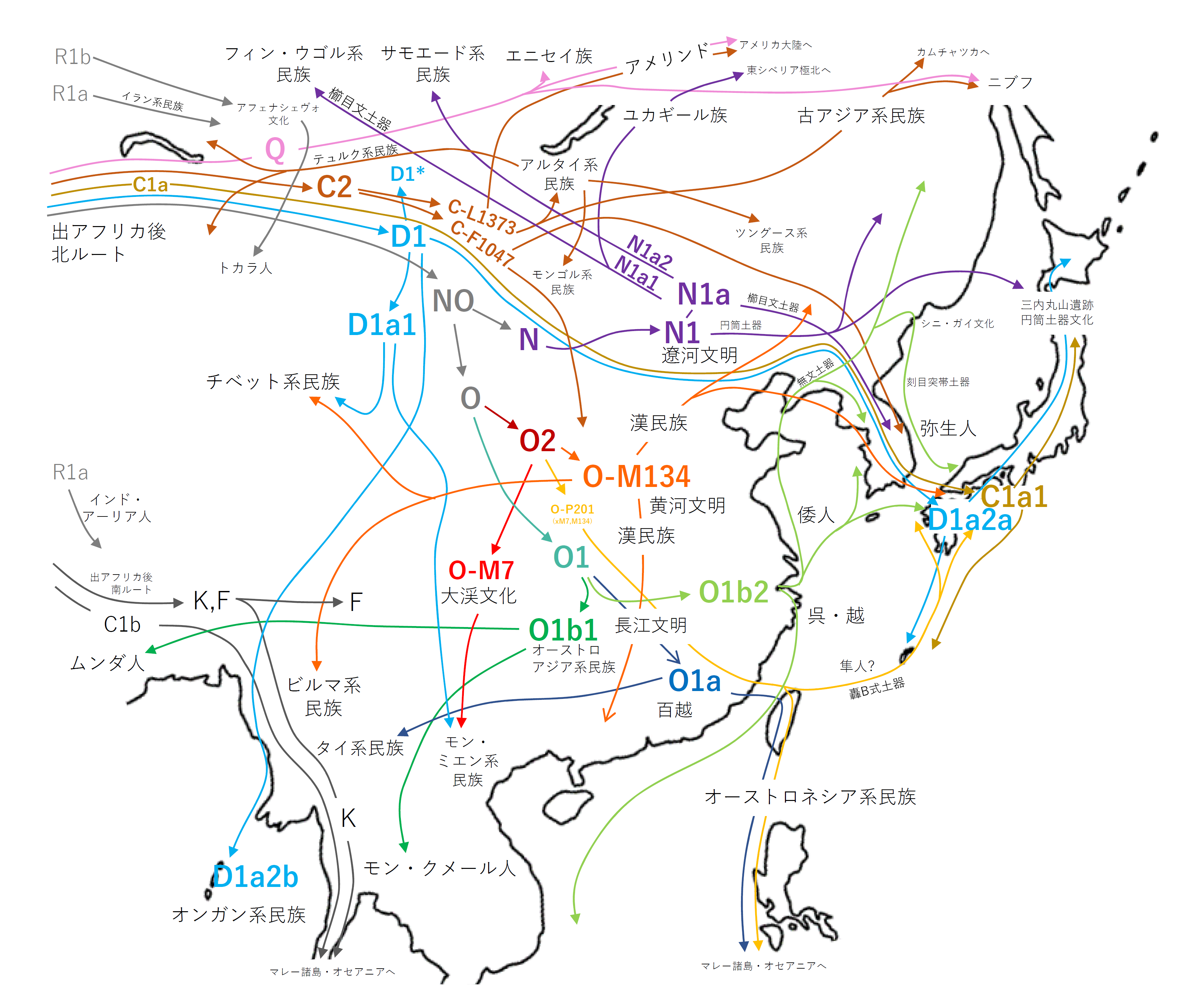 東アジアのY染色体ハプログループ移動図 （異なる年代の移動を同一の図に表している点に注意）